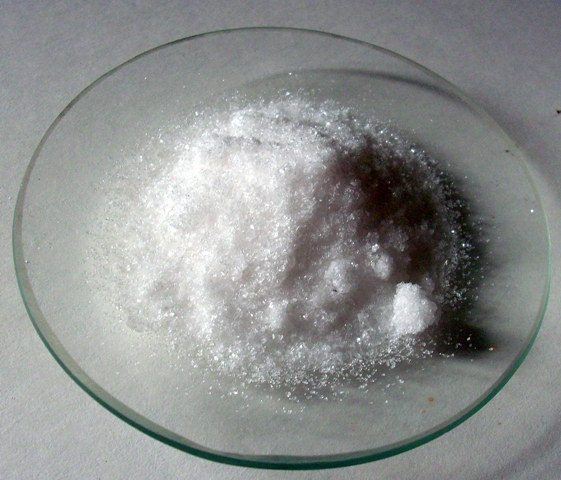 Na2MoO4